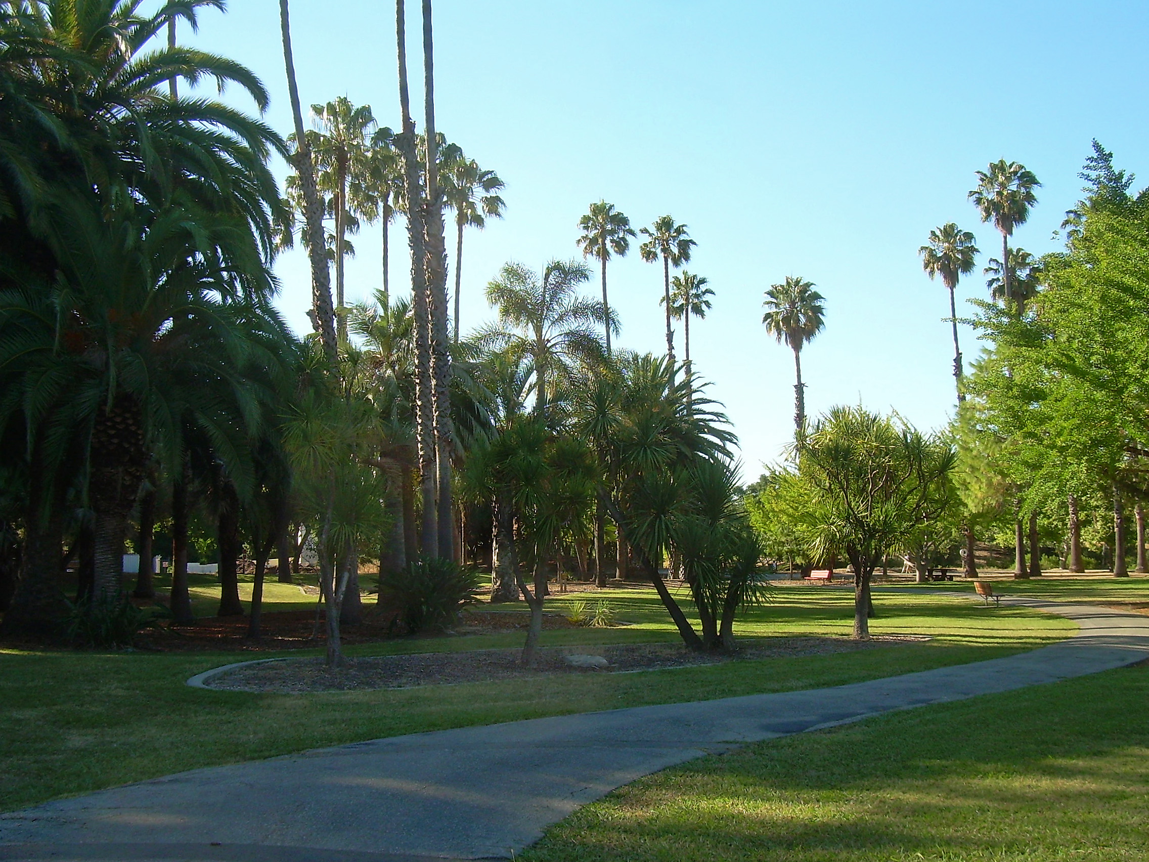 Overfelt Gardens, San Jose, California. San Jose Historic Landmark No. 30. Overfelt Gardens